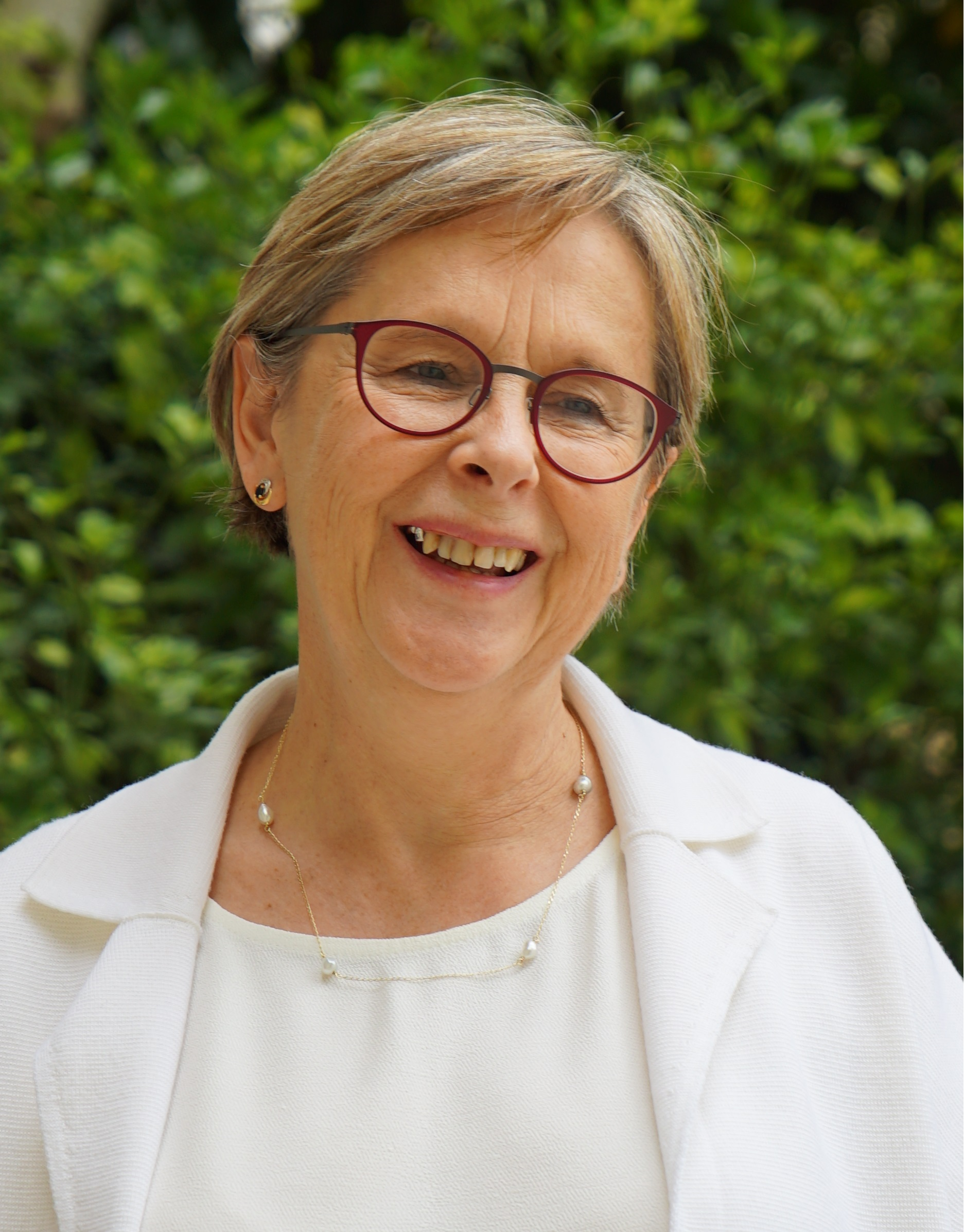 député au palais BOubon.